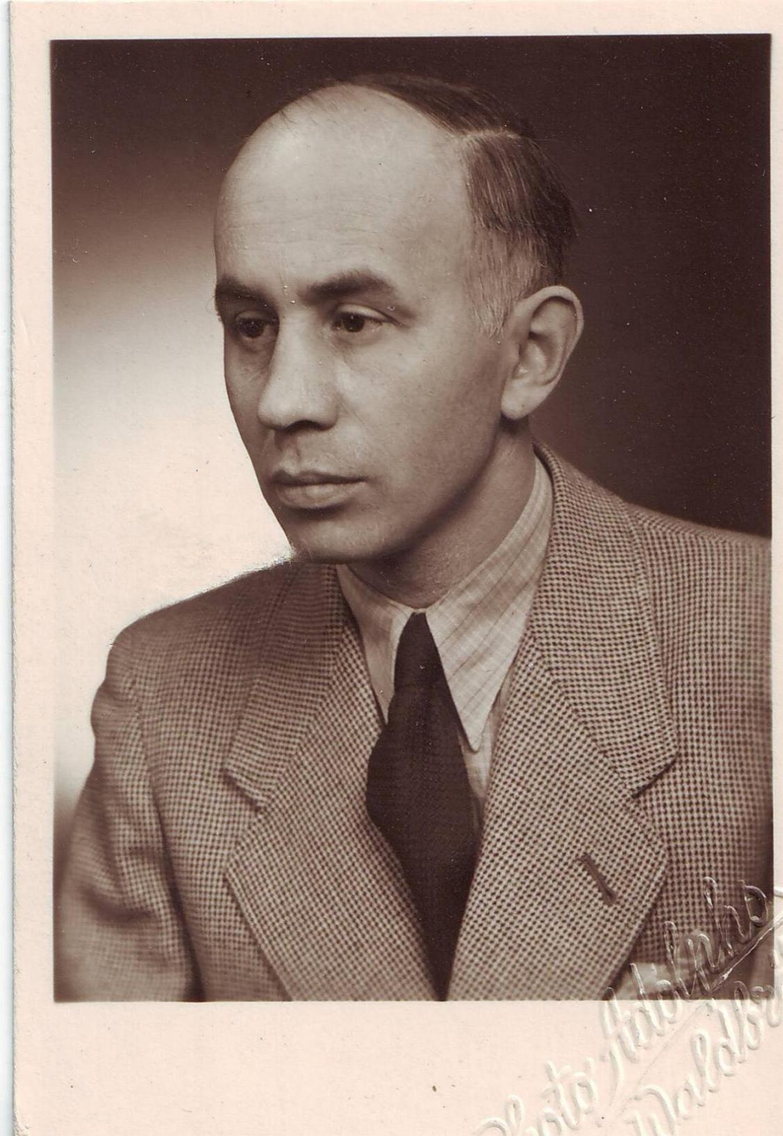 Joachim Hans Hannig (20.04.1907 in Berlin - 1977 in Wetzlar). Pionier im Bereich Glasfaserverstärkter Kunststoff (GfK), Sohn des Bildhauers Julius Robert Hannig